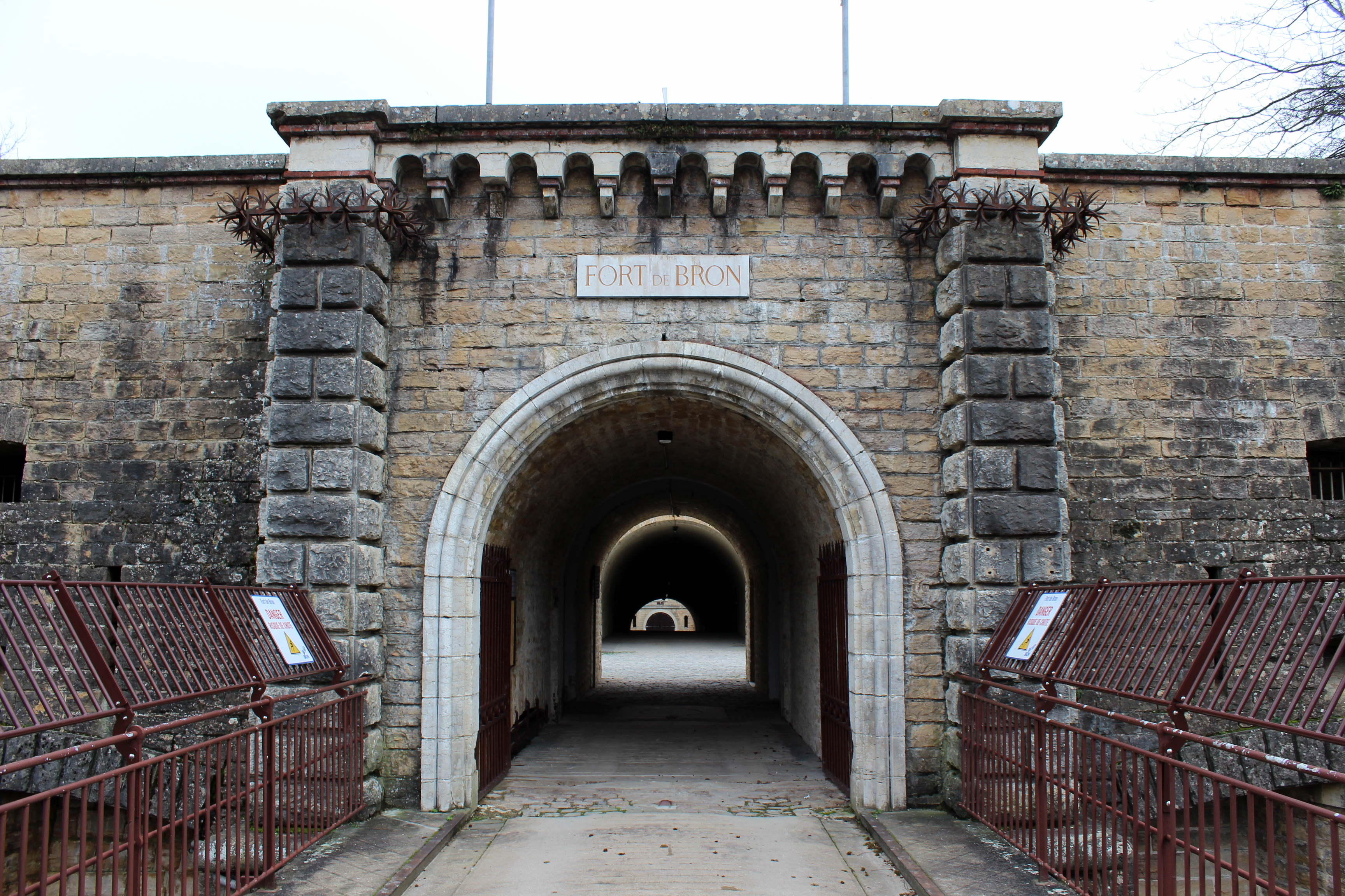 Entrée du fort de Bron.